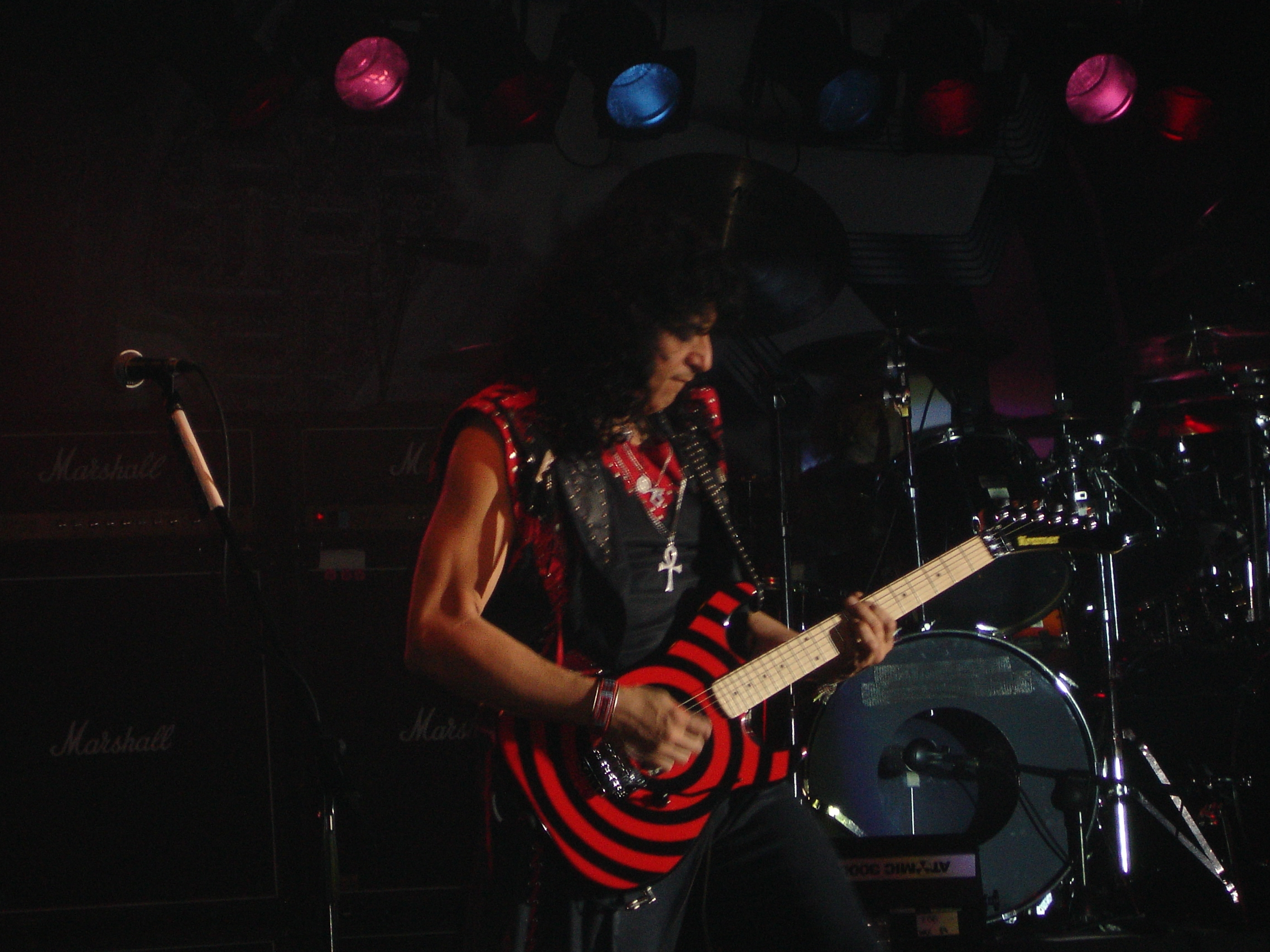 Eddie Ojeda, Twisted Sister